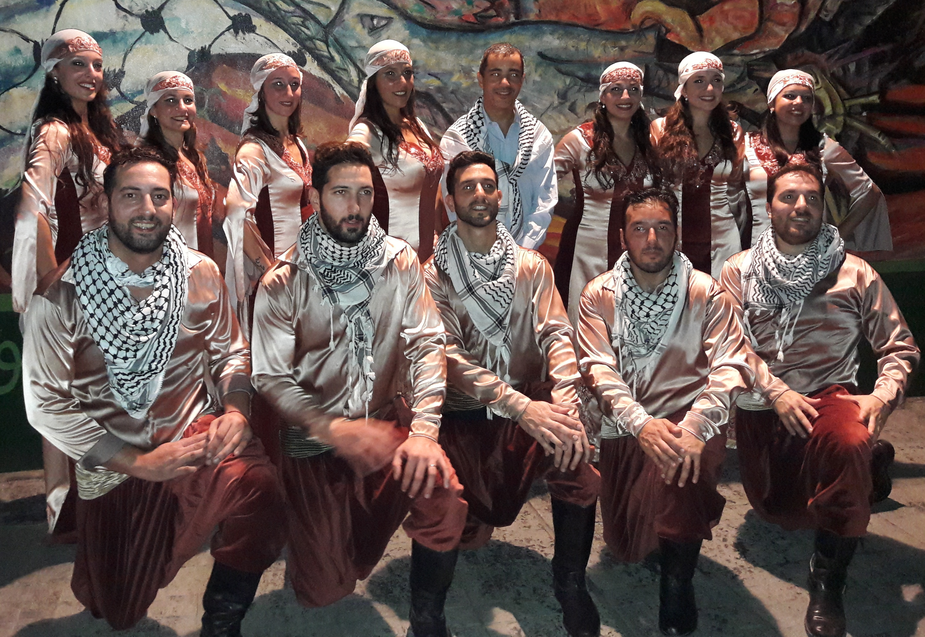 El sábado 1 de abril de 2017, la Embajada de Palestina en Buenos Aires realizó una celebración por el día de la Tierra Palestina, pariticipando la colectividad palestina y demás argentinos interesados.